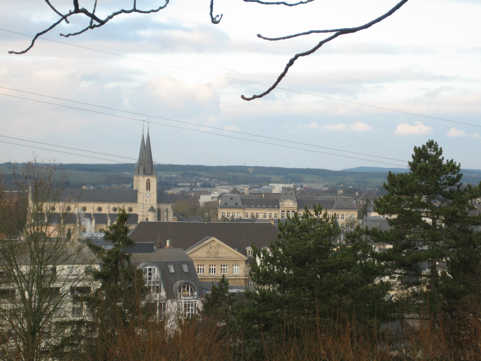 Sujet: Vue op Esch-Uelzecht, vum Gaalgebierg erof. V.l.n.r.: Jousefskierch; Stadhaus, JongelycÃ©e. Auteur: User:Zinneke, Januar 2006. Lizenz: GNU-FDL